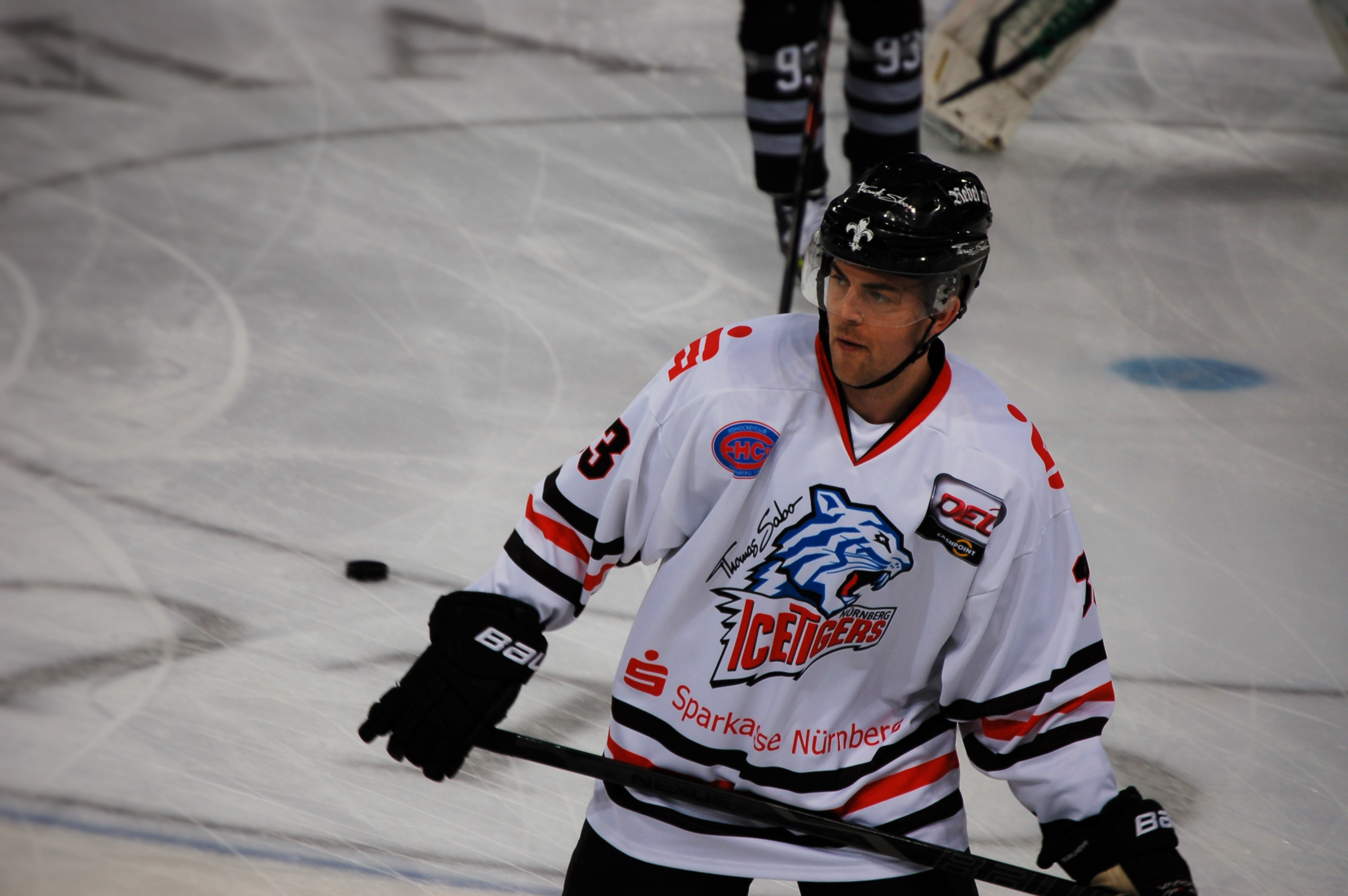 Fredrik Eriksson beim Warm-Up im Trikot der Nürnberg Ice Tigers